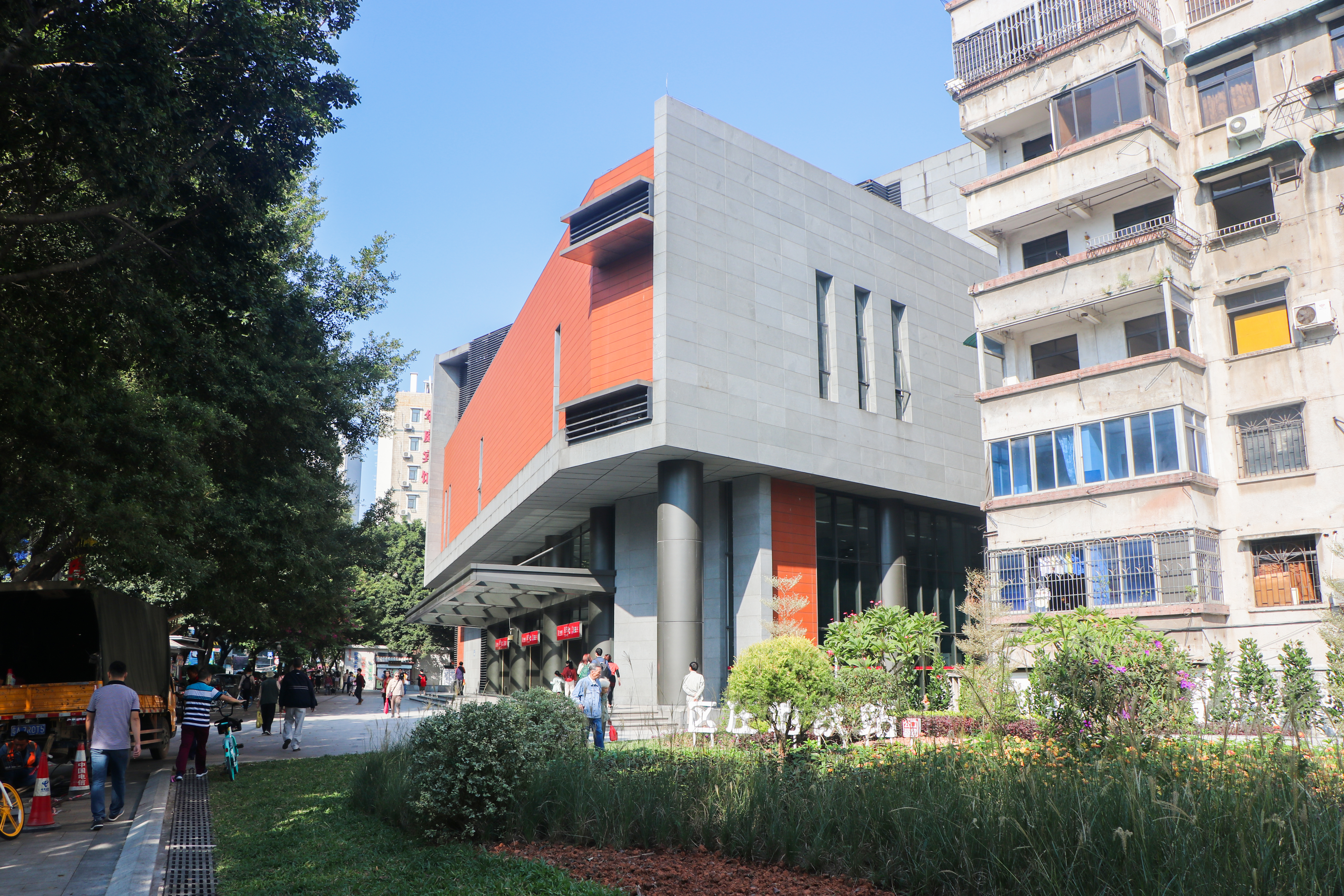 广州地铁区庄站